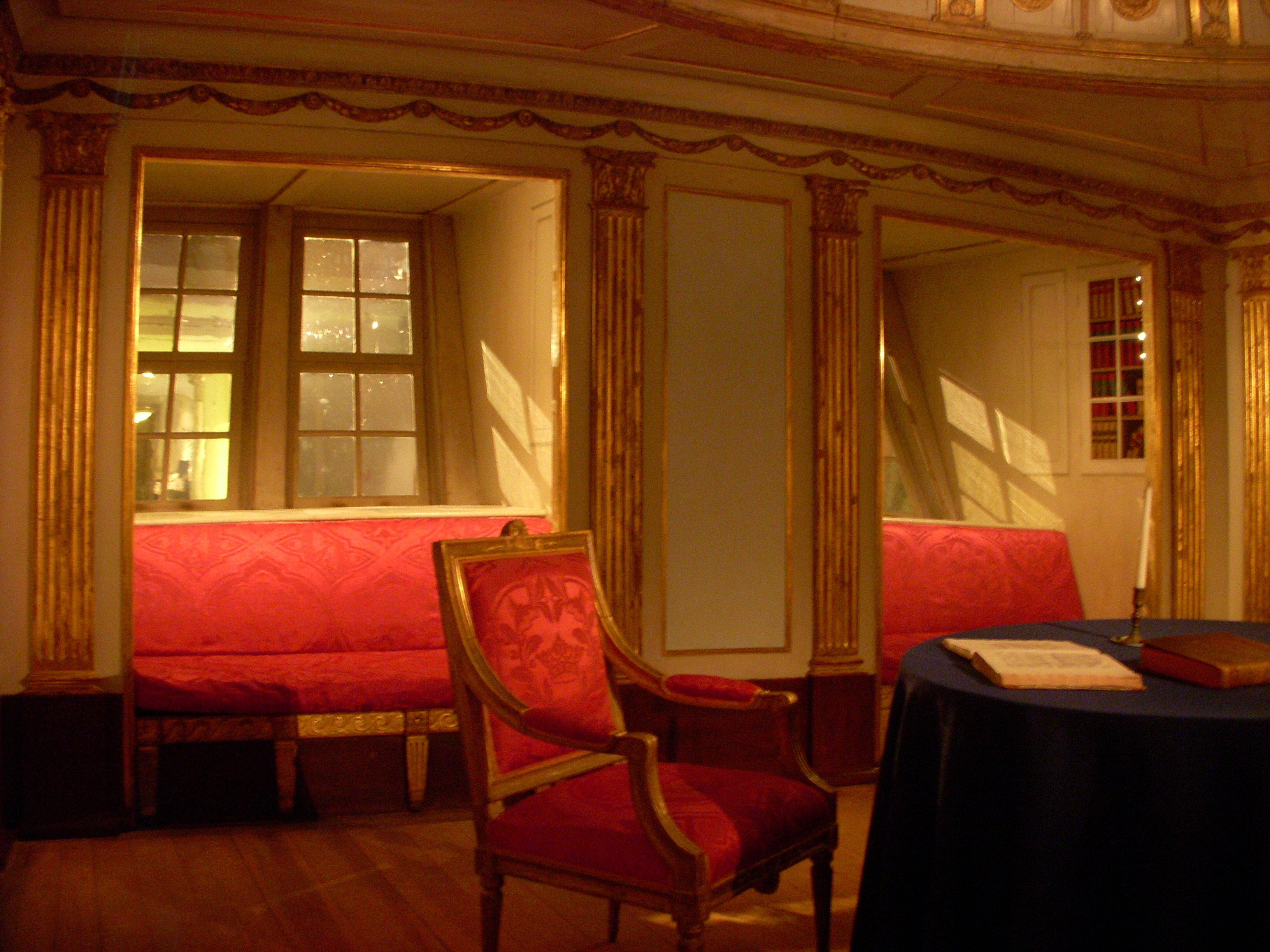 Sjöhistoriska museet i Stockholm, kajutan från Gustav III:s lust- och stabsfartyg Amphion.